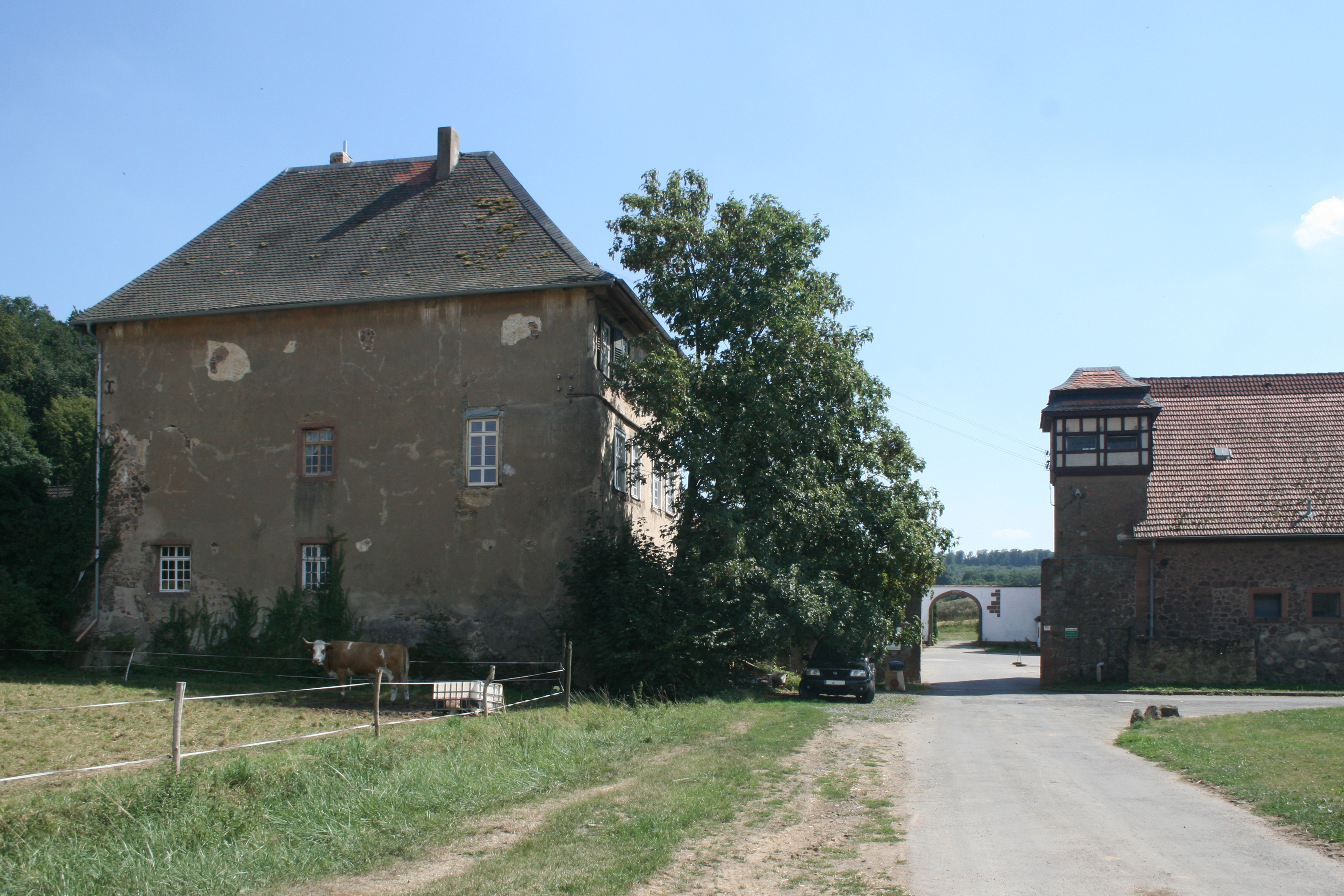 Hof Marienborn bei Büdingen-Eckartshausen.